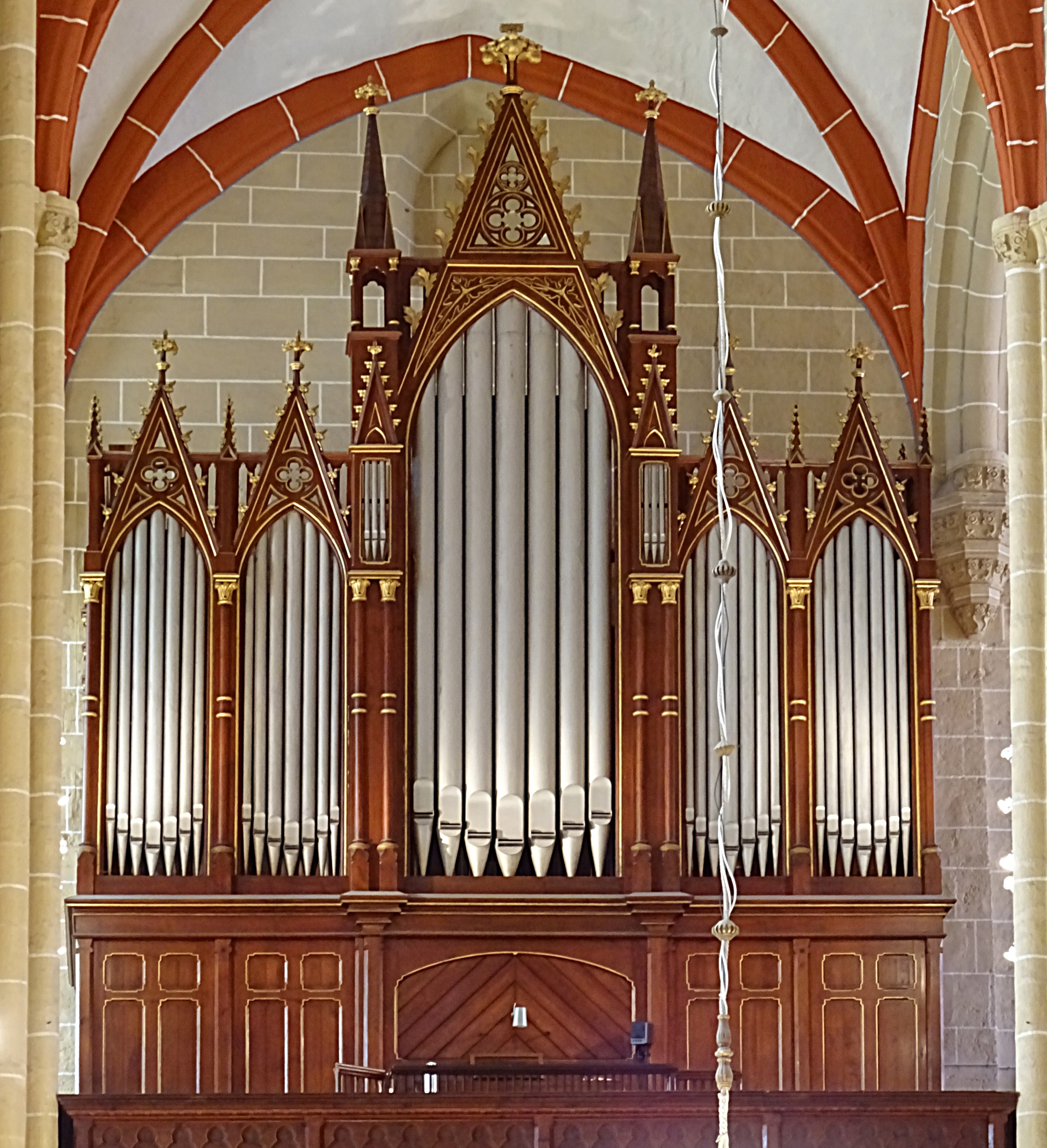 Orgel von Wilhelm Sauer (1891, Opus 544, III/P61) in der Marienkirche (Mühlhausen)